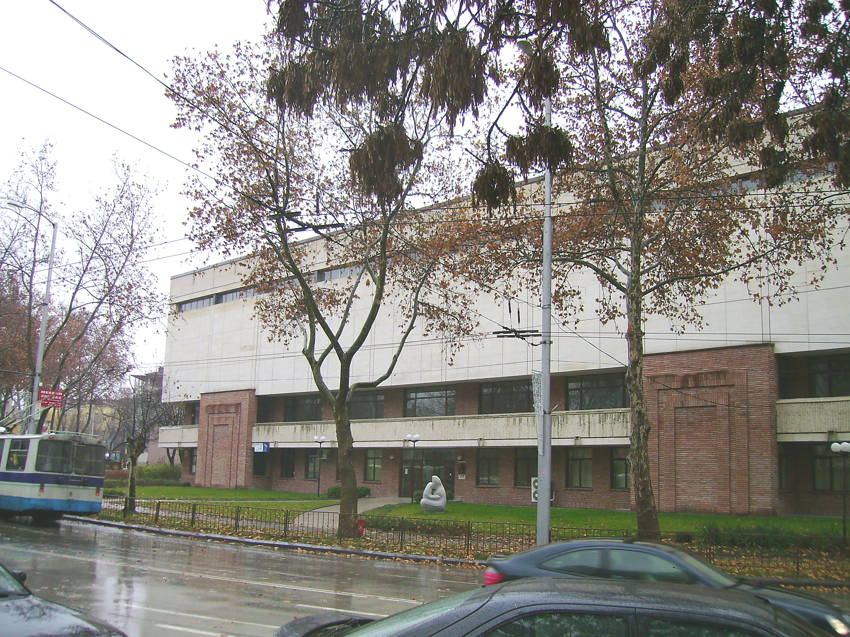 Библиотека / Library